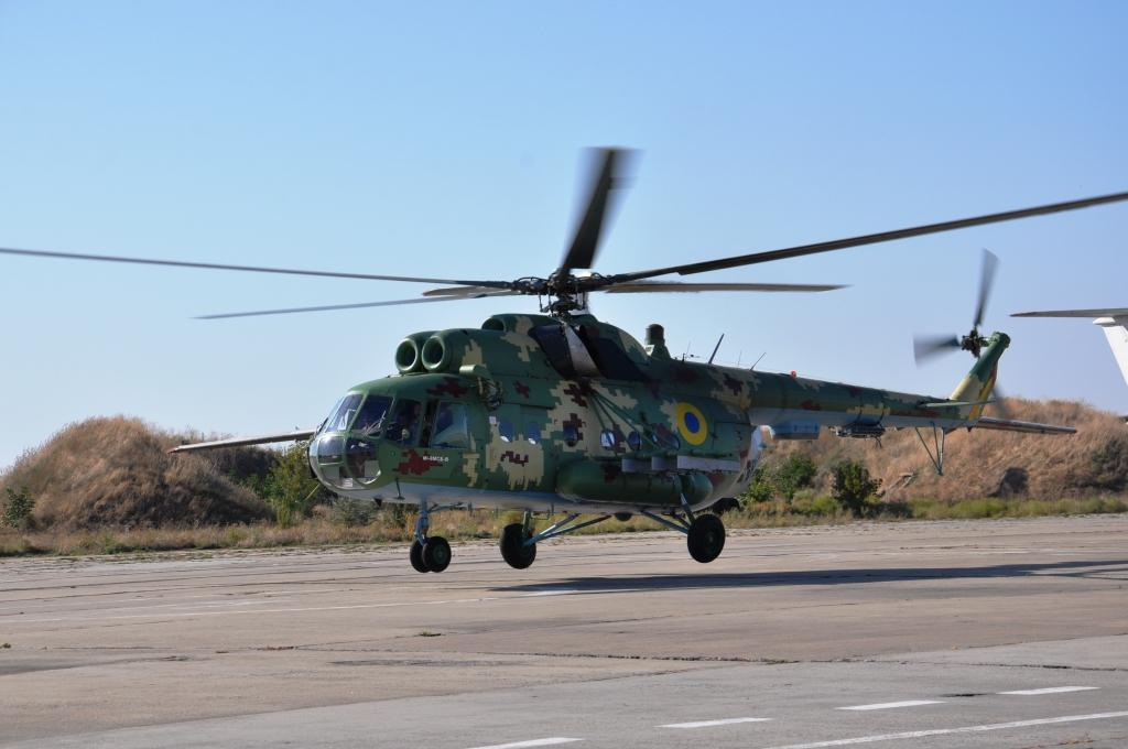 У морській авіаційній бригаді Військово-Морських Сил Збройних Сил України відбулися польоти в рамках льотної підготовки особового складу. У повітря піднімалися гелікоптери Ка-27, Ка-226, а також модернізований Мі-8МСБ-В, який бригада нещодавно отримала на озброєння. — Вертоліт Мі-8 ми отримали нещодавно. Він здатний виконувати різні завдання — транспортні, бойові. На гелікоптері встановлені теплові відбивачі, які розсіюють теплове випромінювання, що знижує можливість ураження ракетами з тепловими головками самонаведення, — розповівльотчик-штурман вертолітної ланки льотної ескадрильї лейтенант Ігор Дейнека.